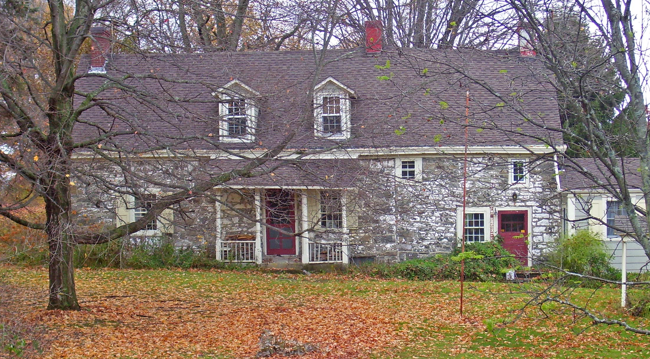 John Lafavre House in Gardiner, NY, USA